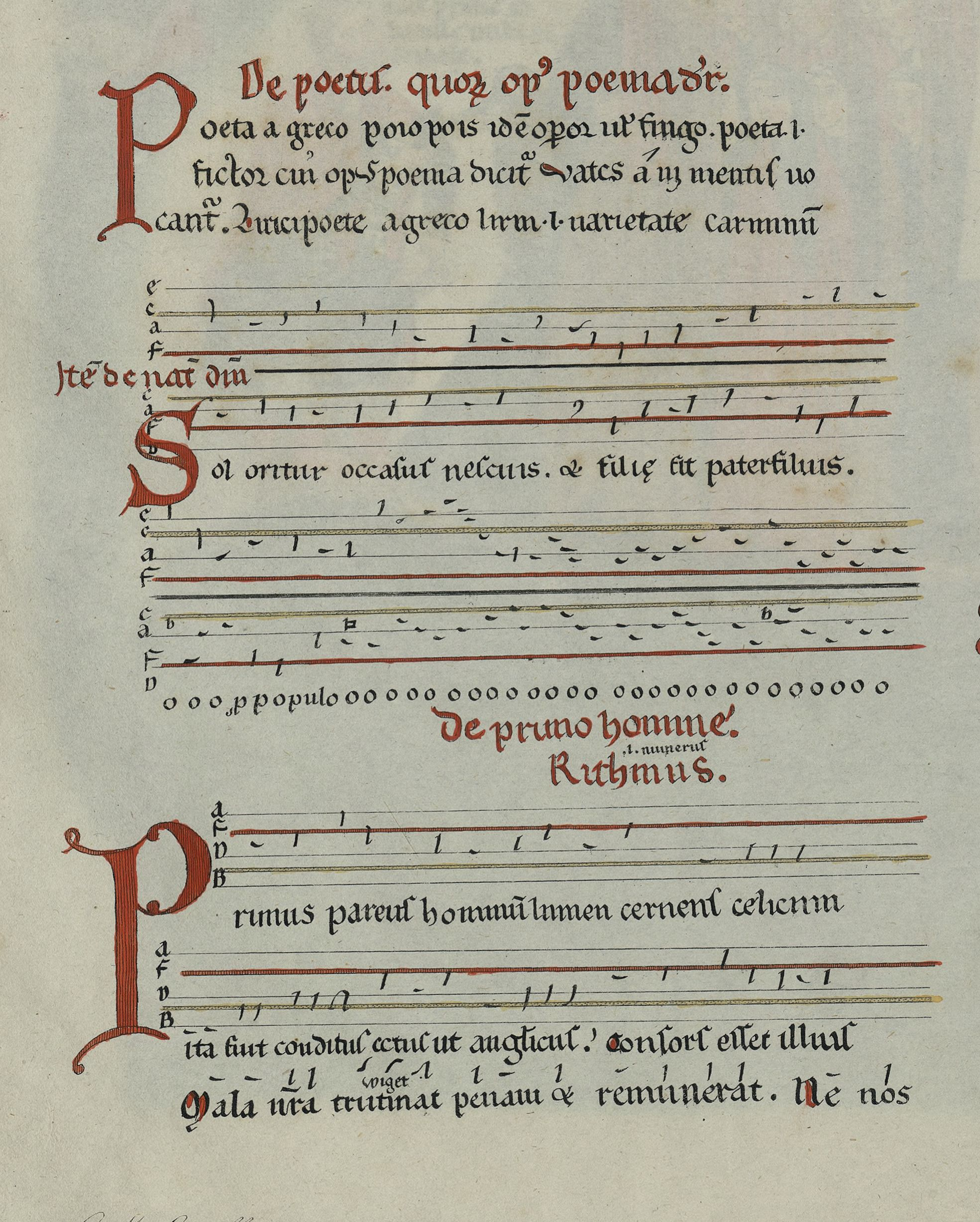 source: Herrad von Landsperg, Aebtissin zu Hohenburg, oder St Odilien, im Elsass, im zwölften Jahrhundert und ihr Werk, Hortus deliciarum : ein Beytrag zur Geschichte der Wissenschafte, Literatur, Kunst, Kleidung, Wassen und Sitten des Mittelalters / von Christian Moritz Engelhardt